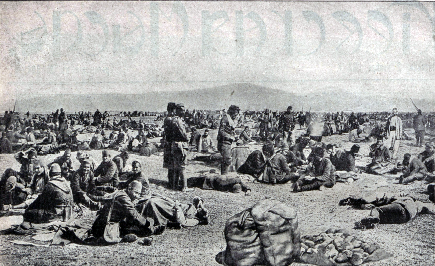 Пленные османские солдаты после сражения у Киркиллиссе (1912)